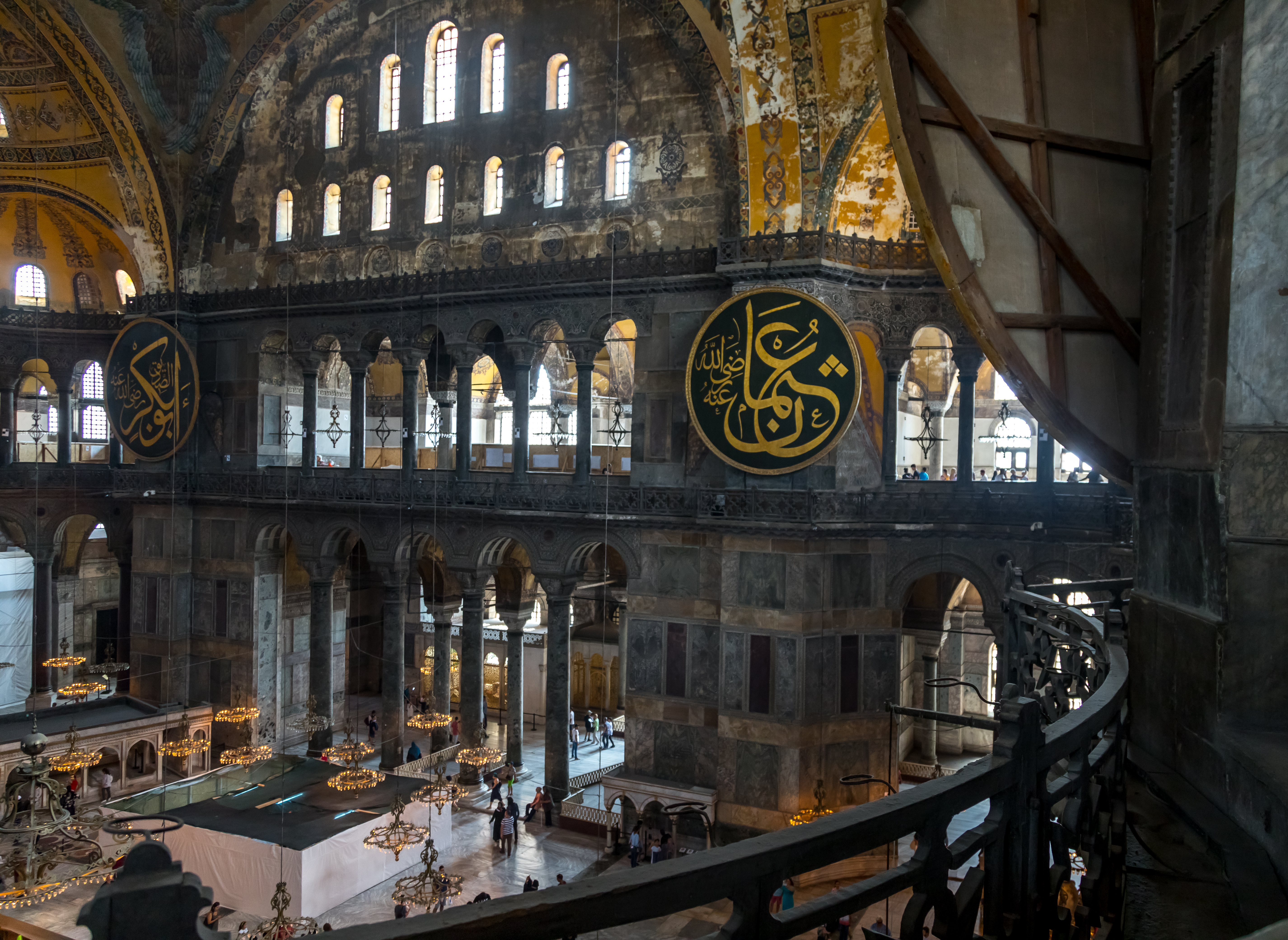 la sala vista dall'alto